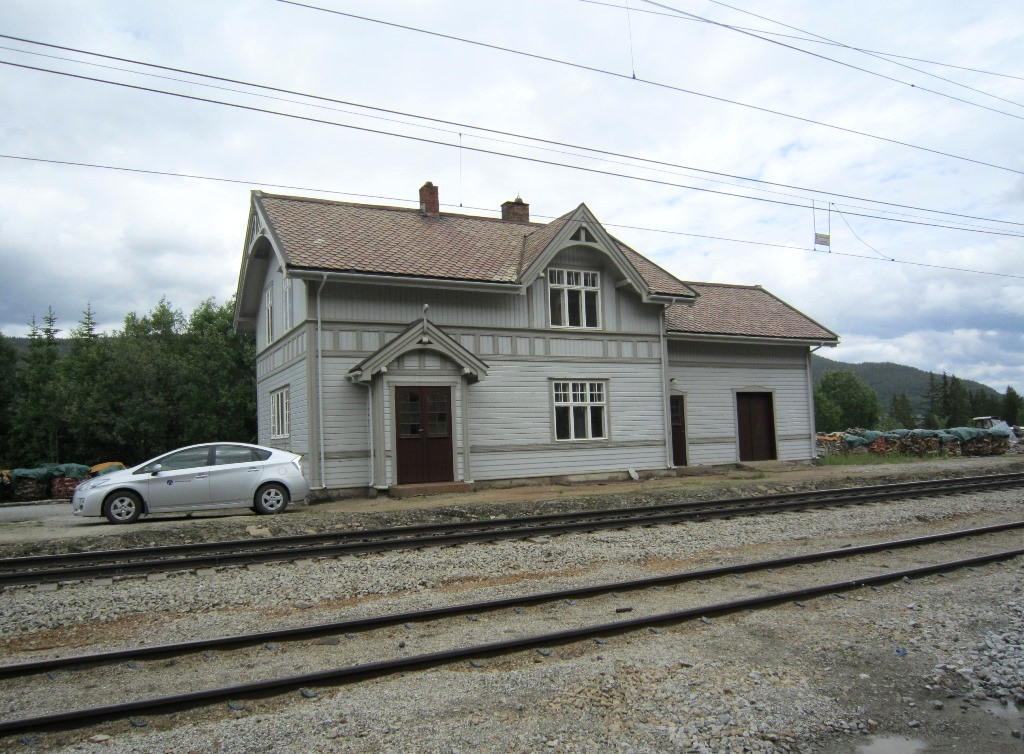 Hol stasjon på Bergensebanen